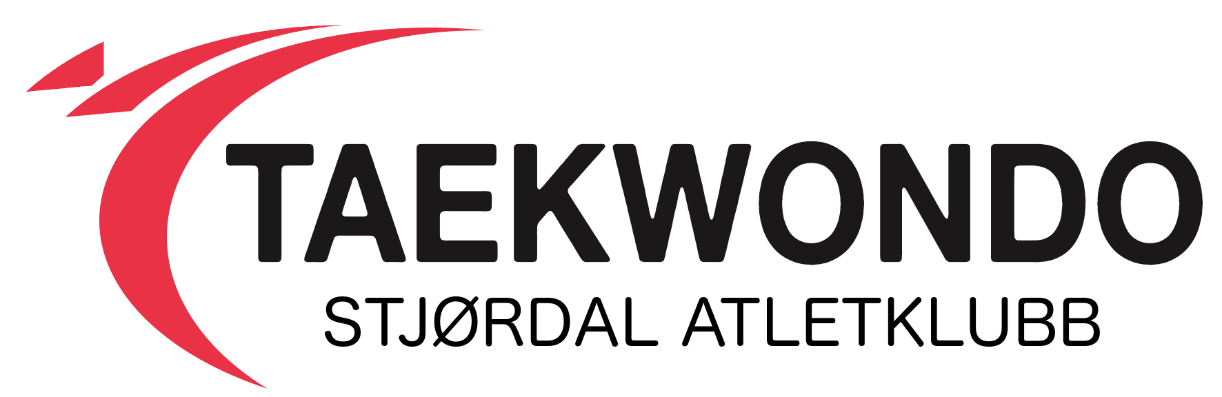 Klubblogoen